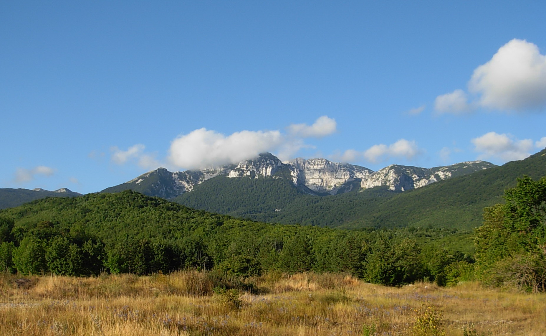 аутор Попарић Миле. Фотографија је снимљена са пута Ливно-Босанско Грахово у селу Сајковић у августу 2008. године